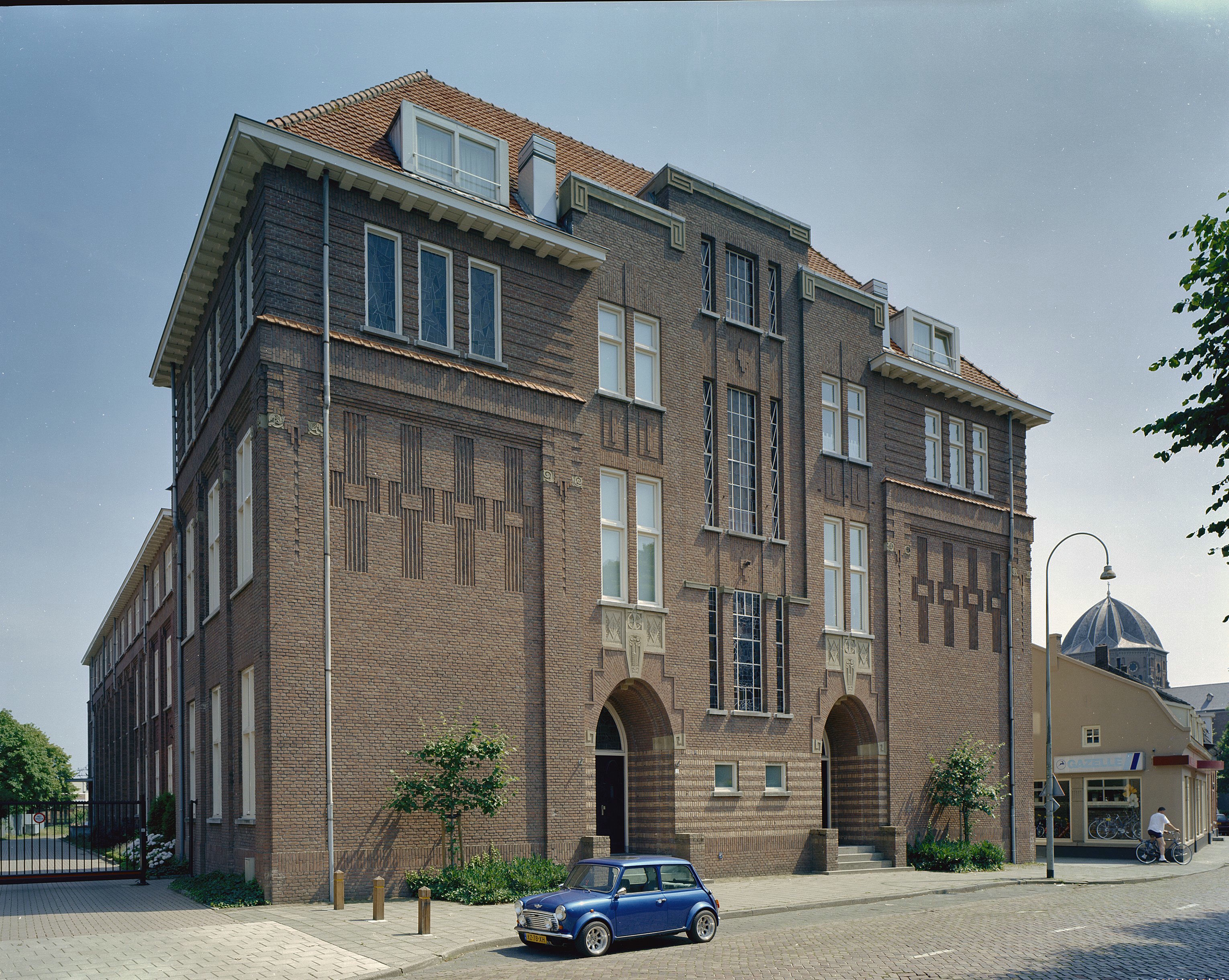 Kloostercomplex: Voorgevel en rechter zijgevel